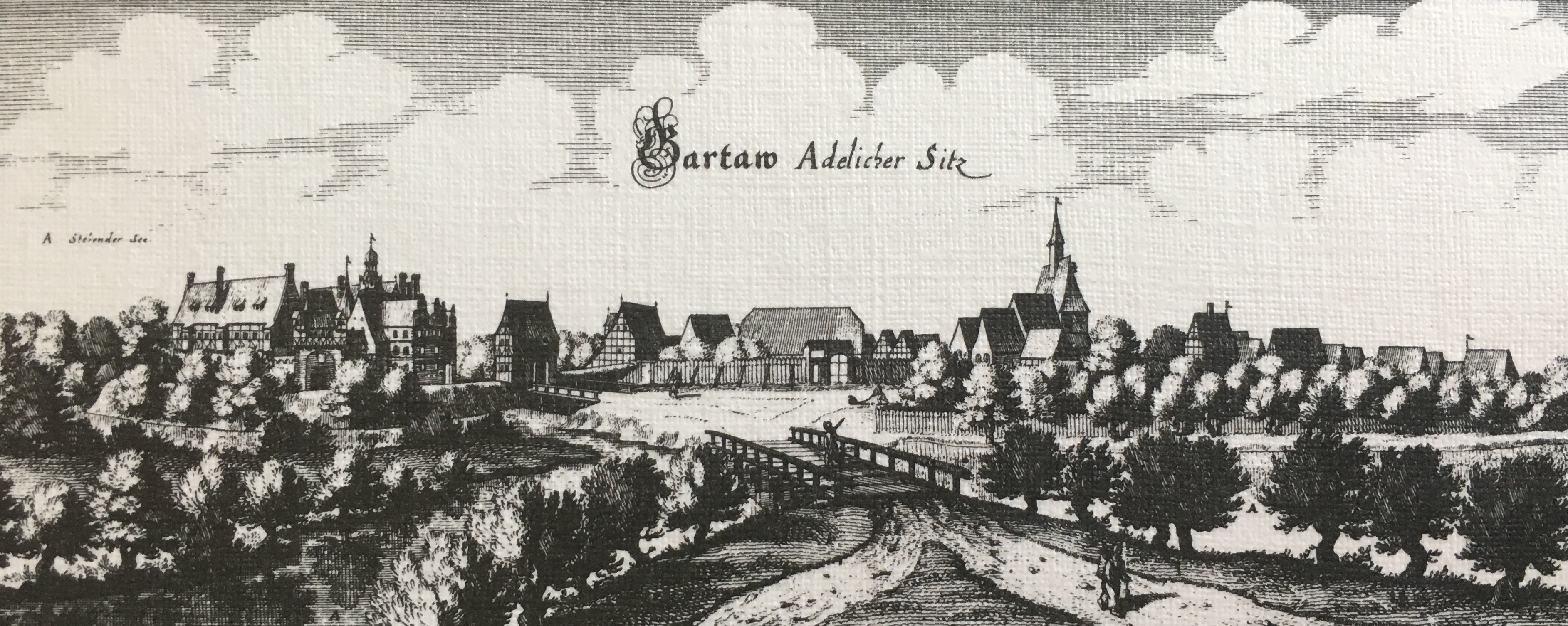 Ansicht von Gartow um 1650, Kupferstich